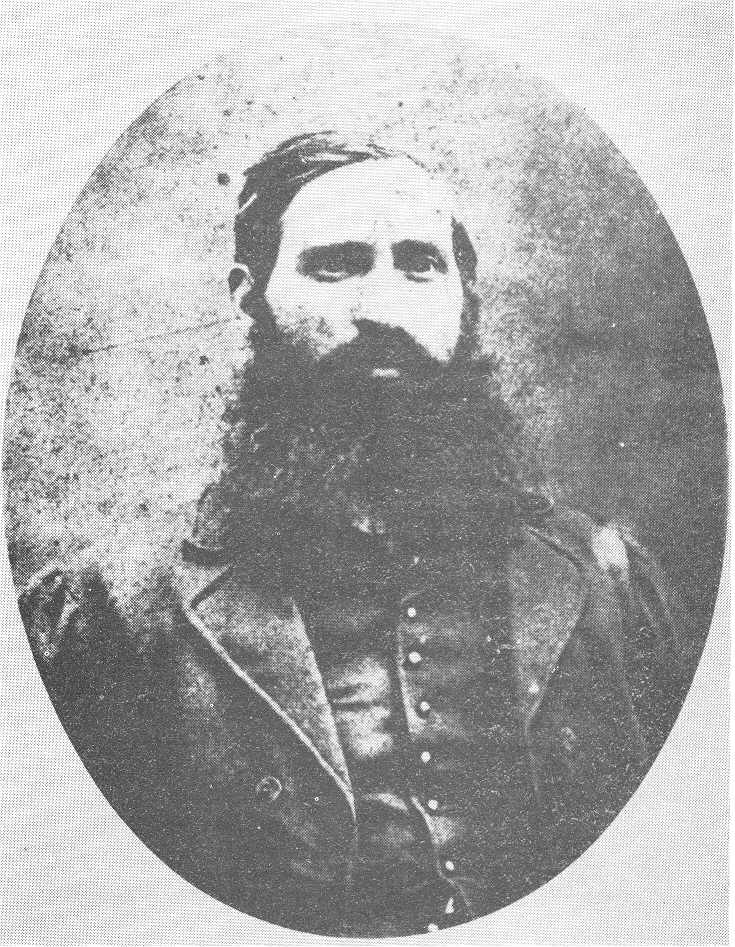 il brigante Carmine Crocco